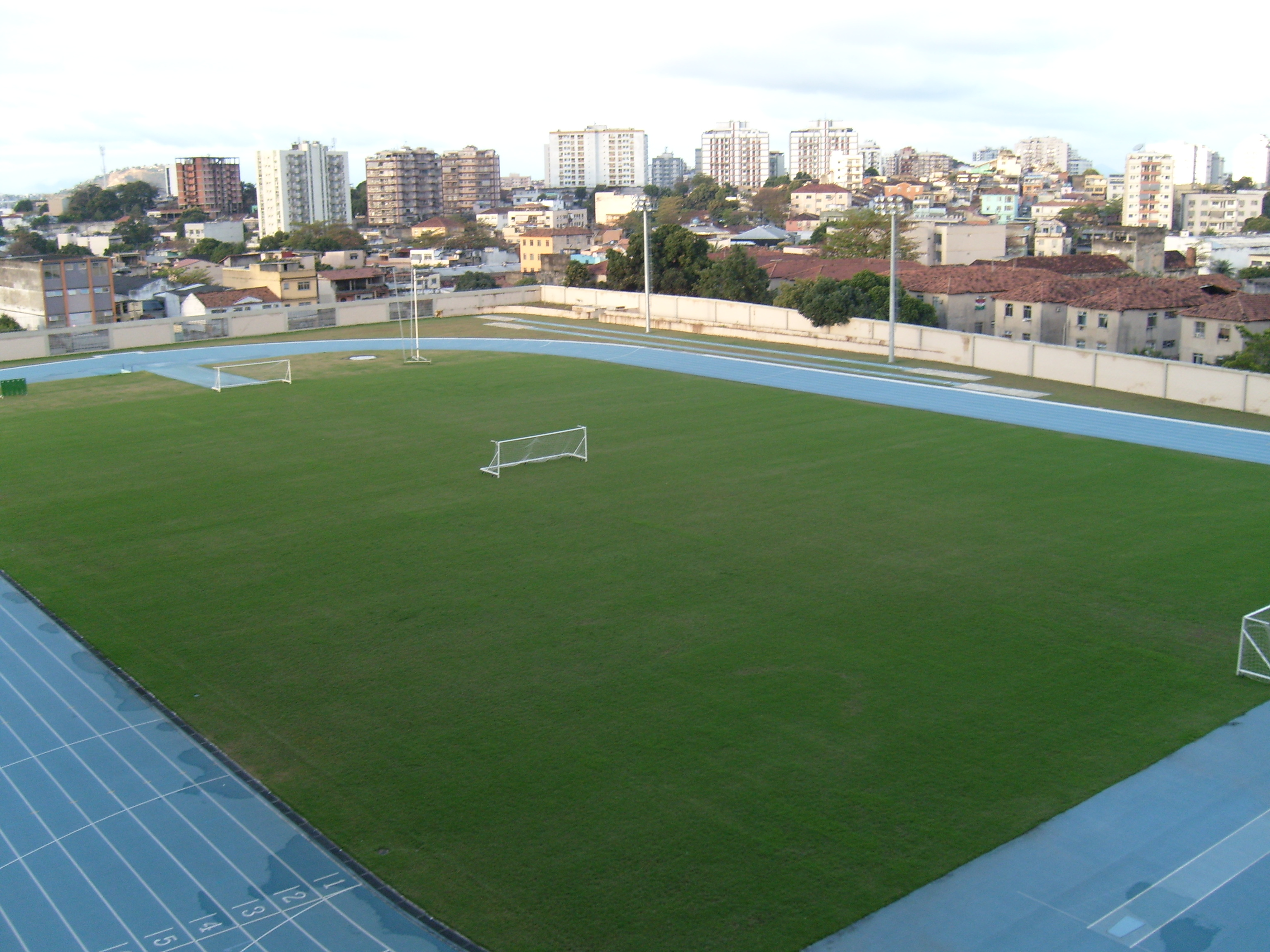 Campo anexo do Estádio Olímpico João Havelange, o Engenhão, do Botafogo de Futebol e Regatas.